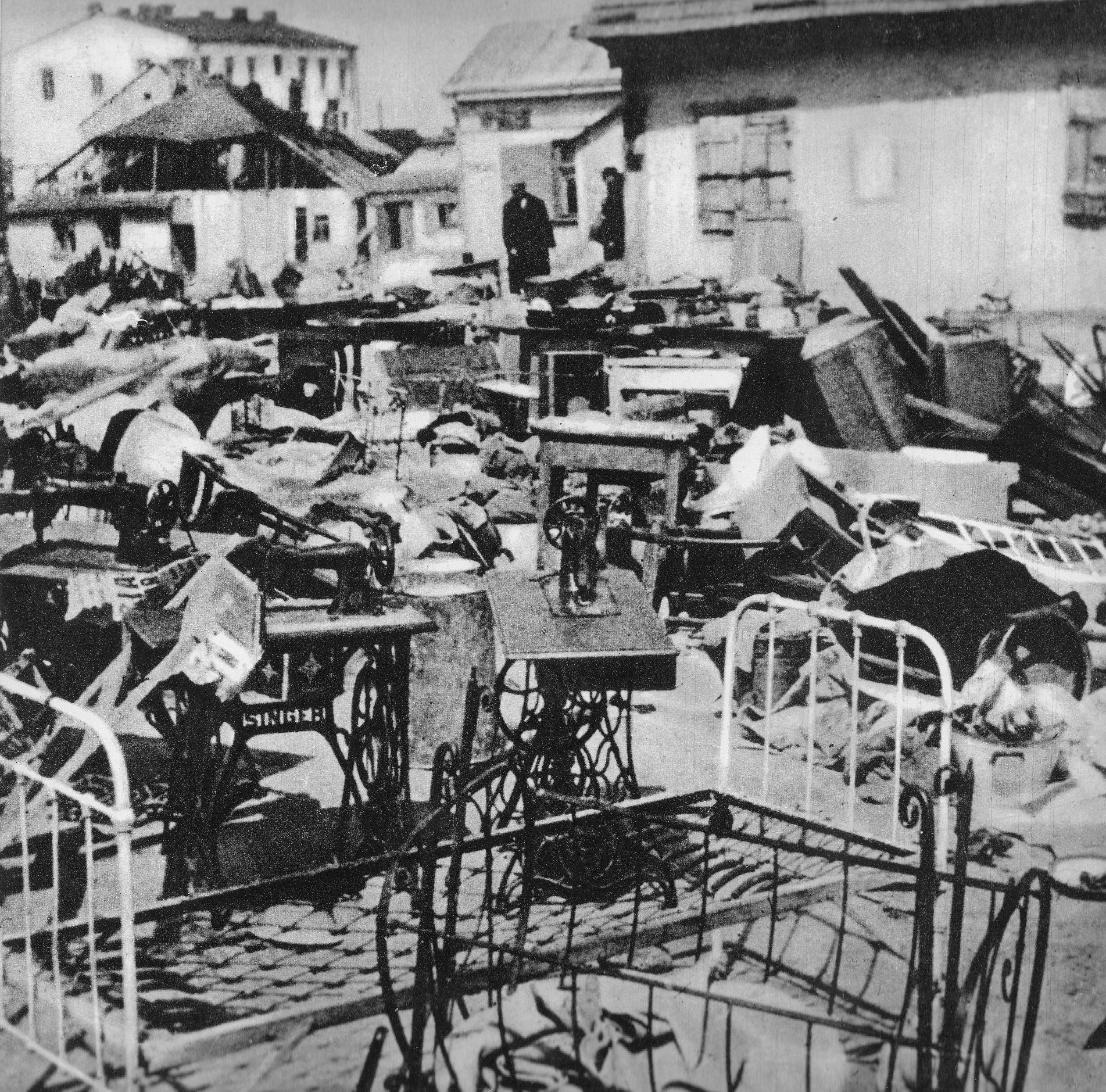 Lublin. Sprzęty i przedmioty domowego użytku zagrabione Żydom deportowanym do obozu zagłady.